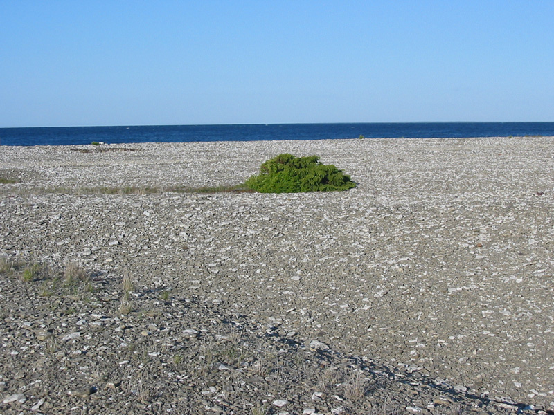 Siim Sepp, 2003